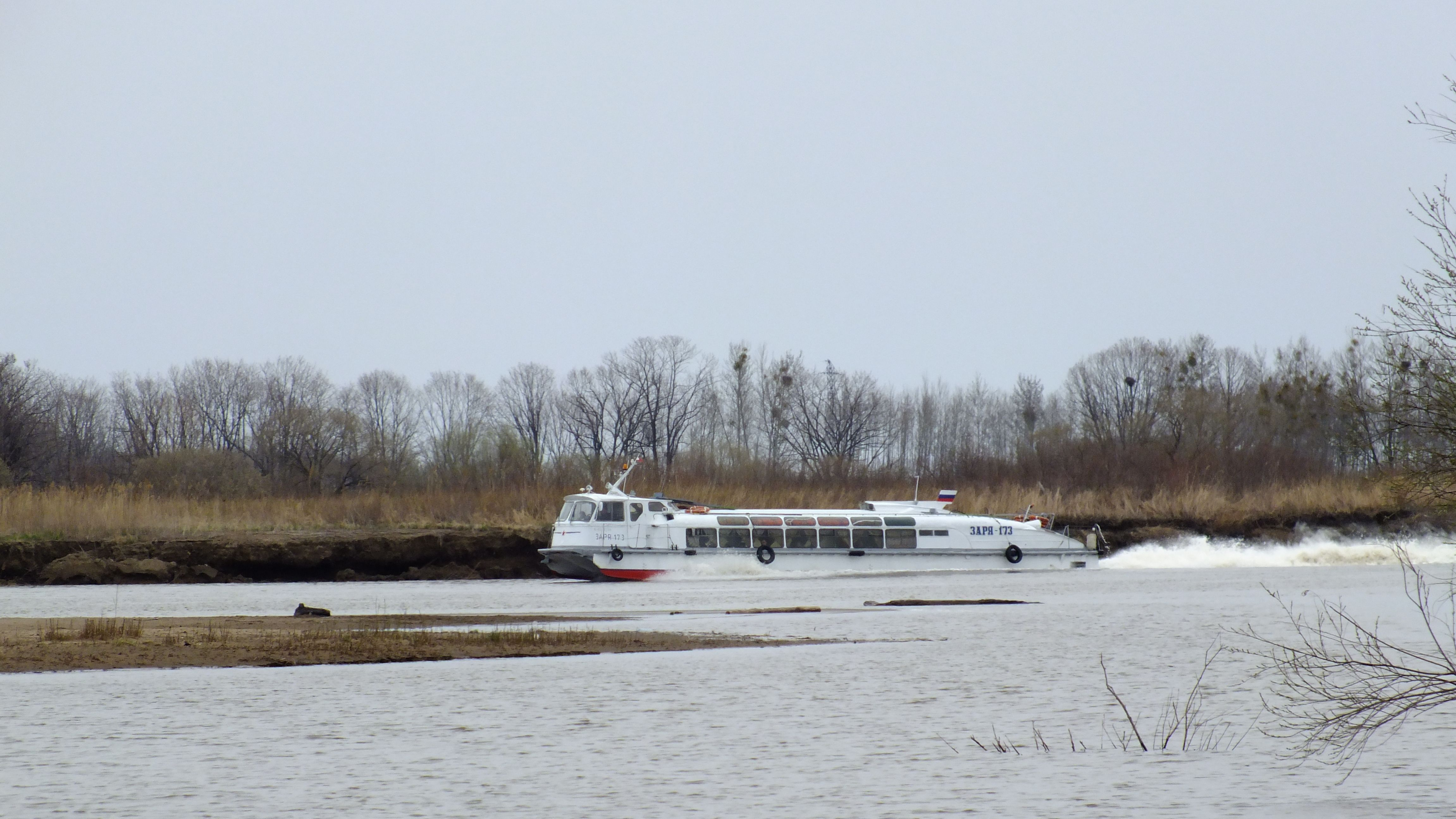 Zarya-173 (ship, 1975)